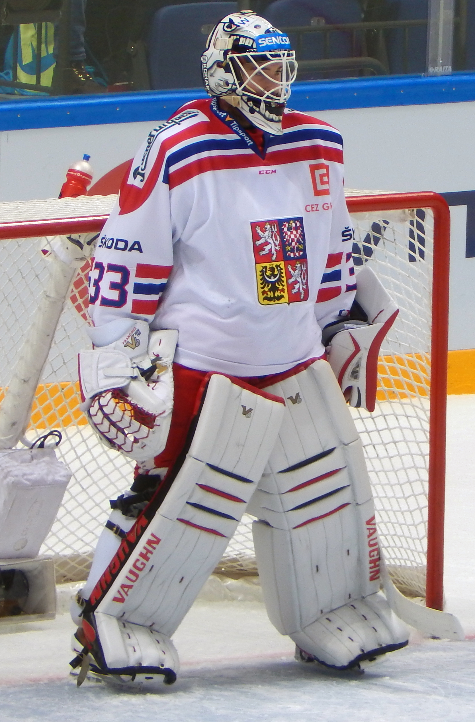 Францоуз на Кубке Первого Канала 2015 против Швеции